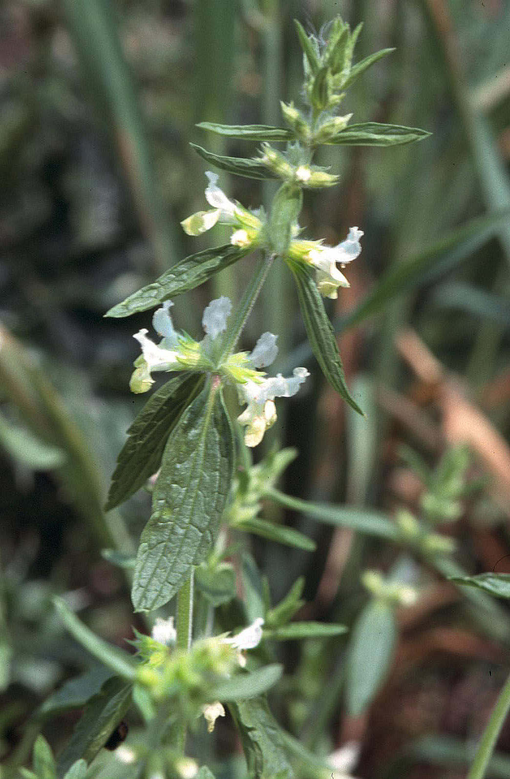 Stachys annua in Unterfranken